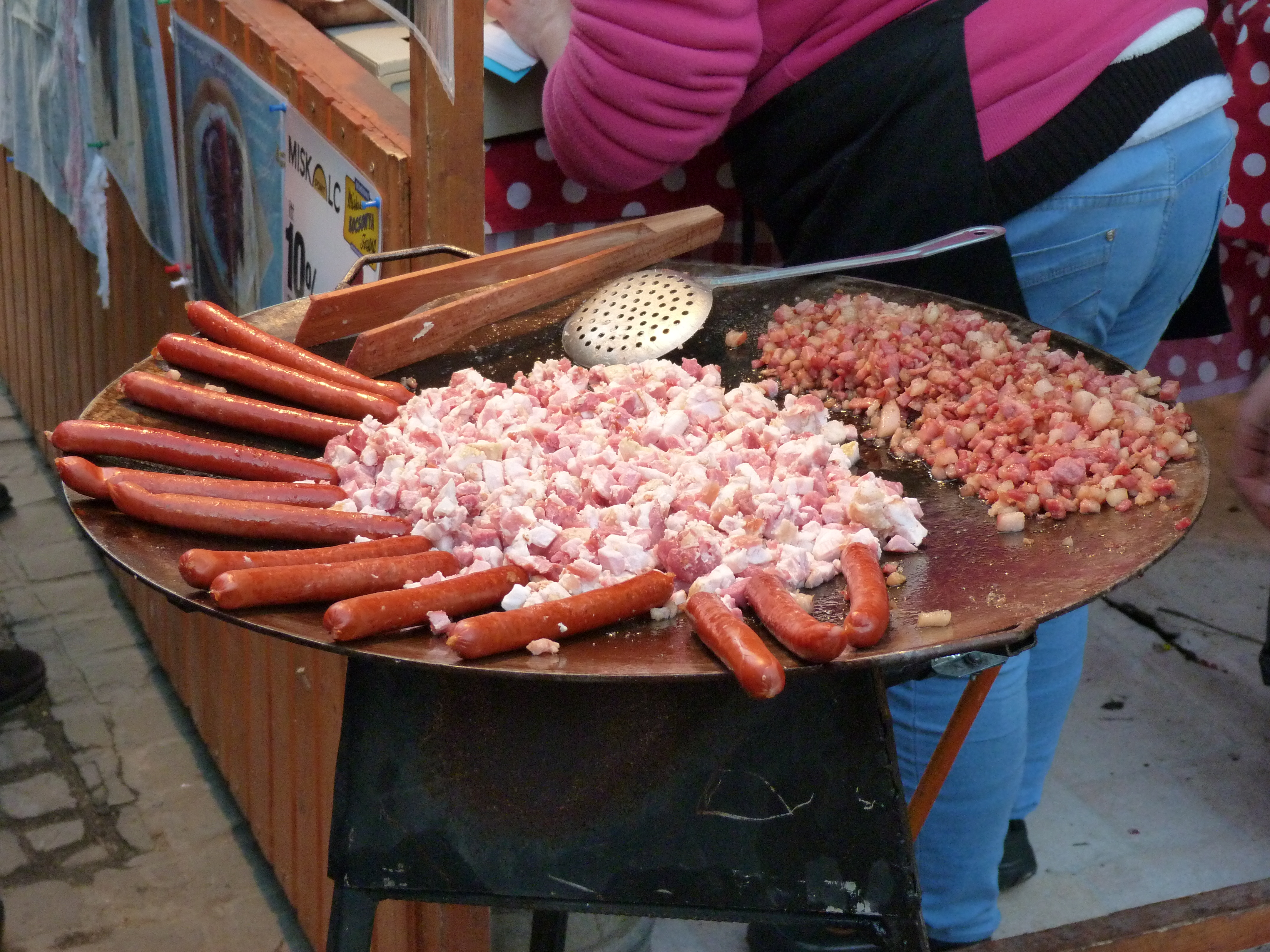 A felvétel 2015. február 7-én szombaton készült Miskolcon. Miskolci Kocsonyafesztivál. ©© Derzsi Elekes Andor, Budapest, 2015, Published in the Metapolisz DVD line. You are authorised to use this vid under Creative Commons – even for commercial, for profit purposes. The vid must be attributed to Derzsi Elekes Andor. All of the photos and vids in the Metapolisz DVD line are under Creative Commons and can be used even for commercial – for profit – purposes. Recommended Citation Derzsi Elekes Andor: Metapolisz DVD line